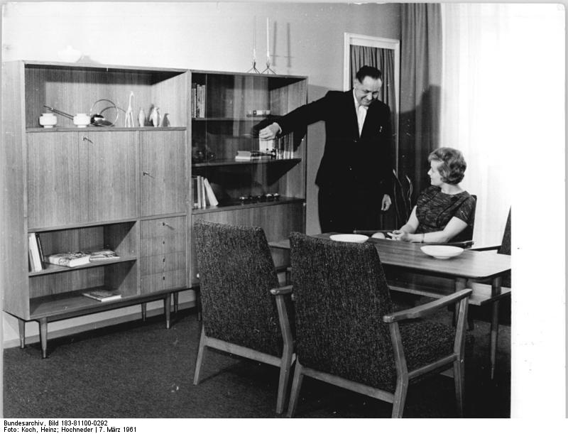 Schrankwand, VEB Deutsche Werkstätten Hellerau Zentralbild Koch-Hochneder Nl-Pz 7.3.1961 Messe-Sonderdienst - Leipziger Frühjahrsmesse 1961 Messehaus "Union" UBz: Der VEB Deutsche Werkstätten Hellerau zeigt im Messehaus "Uniion" u. a. ein Wohnzimmer in Nußbaum, natur mattiert. Der Entwurf stammt von Prof. Selmanagic.